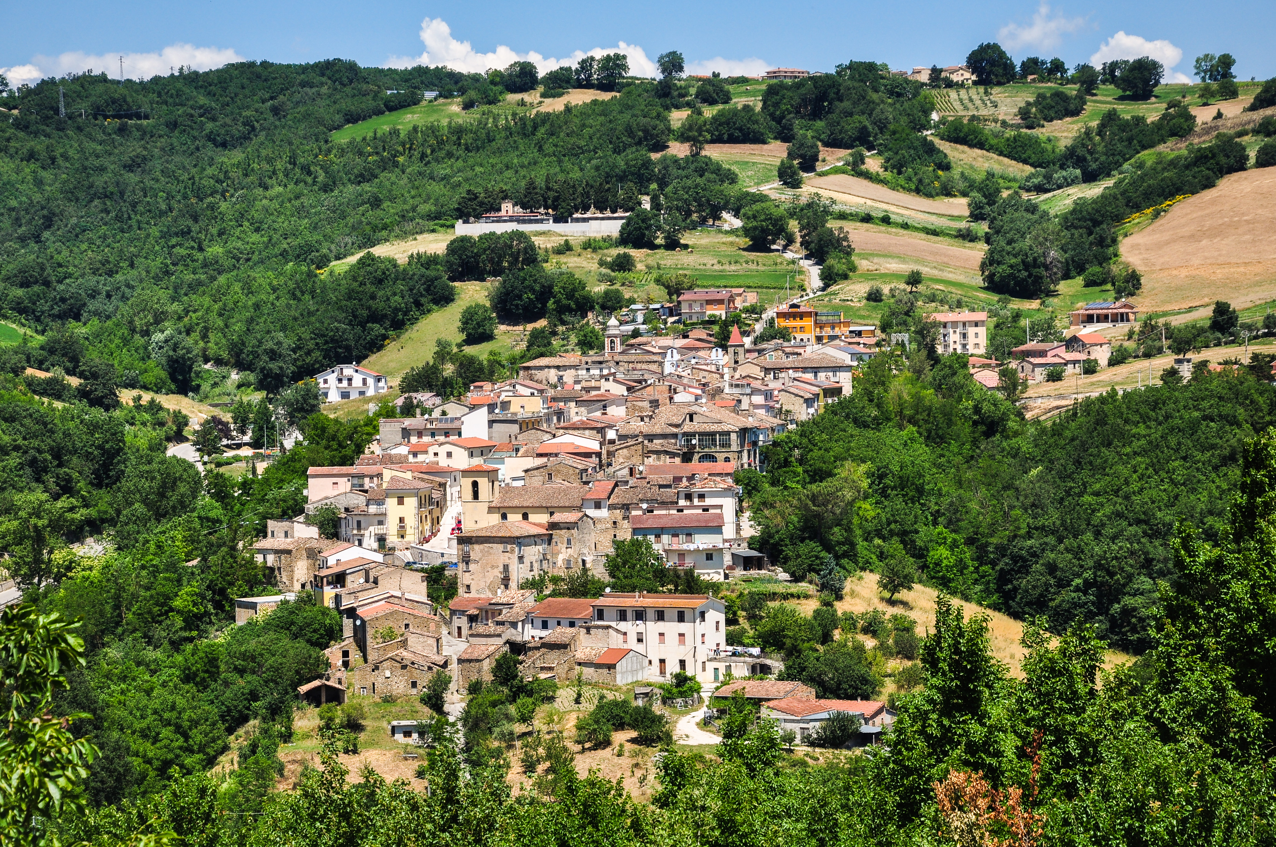 Immagine del centro di Spinete da una delle borgate